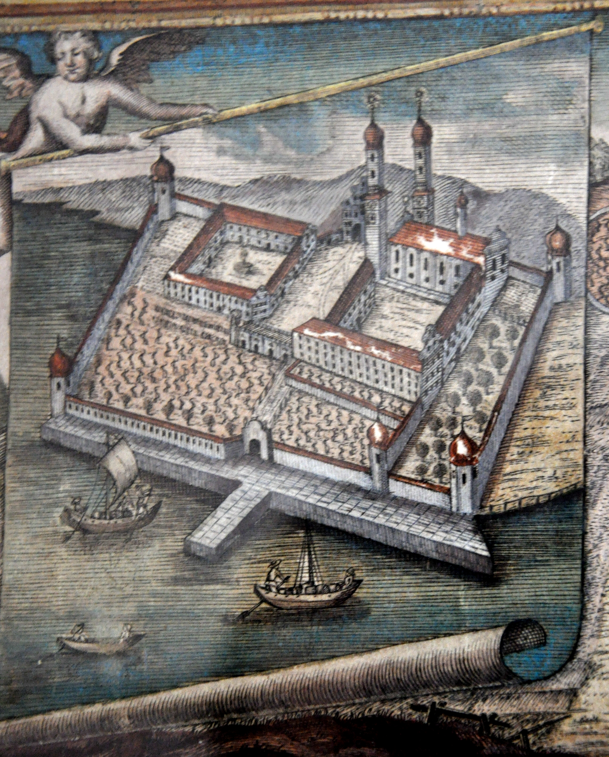 Letzte Konventsliste der Reichsabtei Weingarten (unter Abt Anselm Rittler), kolorierter Kupferstich, 1801; Stadtmuseum Weingarten Detail: Priorat Hofen (heute Schloss Friedrichshafen mit Schlosskirche)